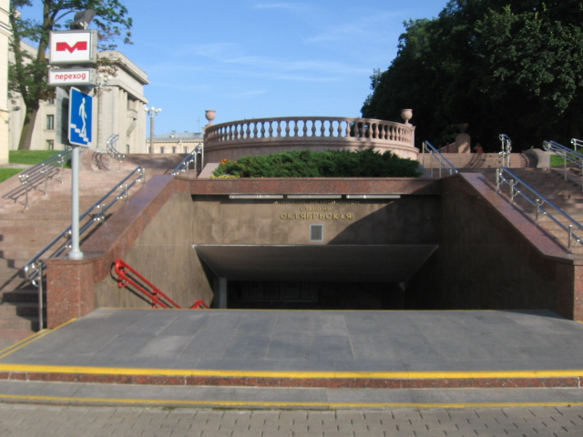 Октябрьская (станция метро, Минск)